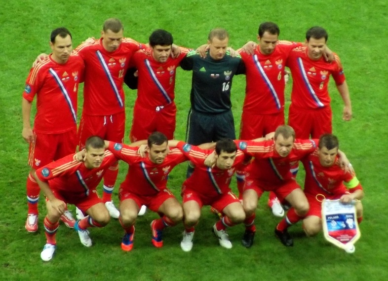 Zdjęcie zrobione w piątym dniu UEFA Euro 2012 w Warszawie, marszu rosyjskich kibiców i meczu Polska-Rosja.